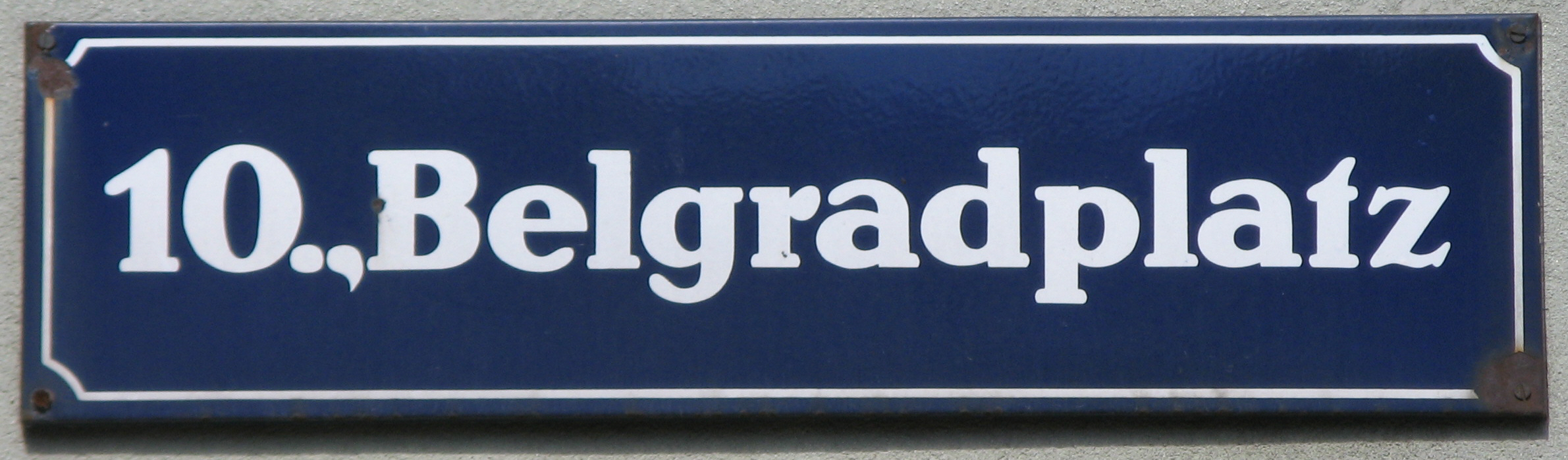 Straßenschild Belgradplatz, Wien-Favoriten